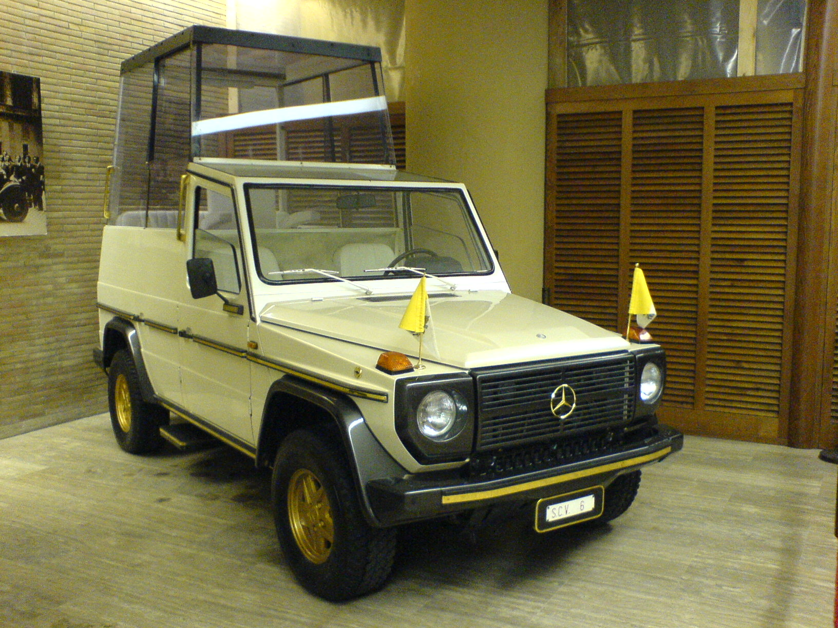 Pausmobiel